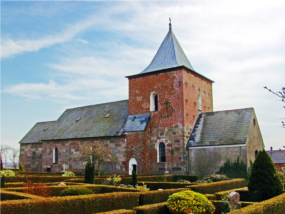 fra nordvest